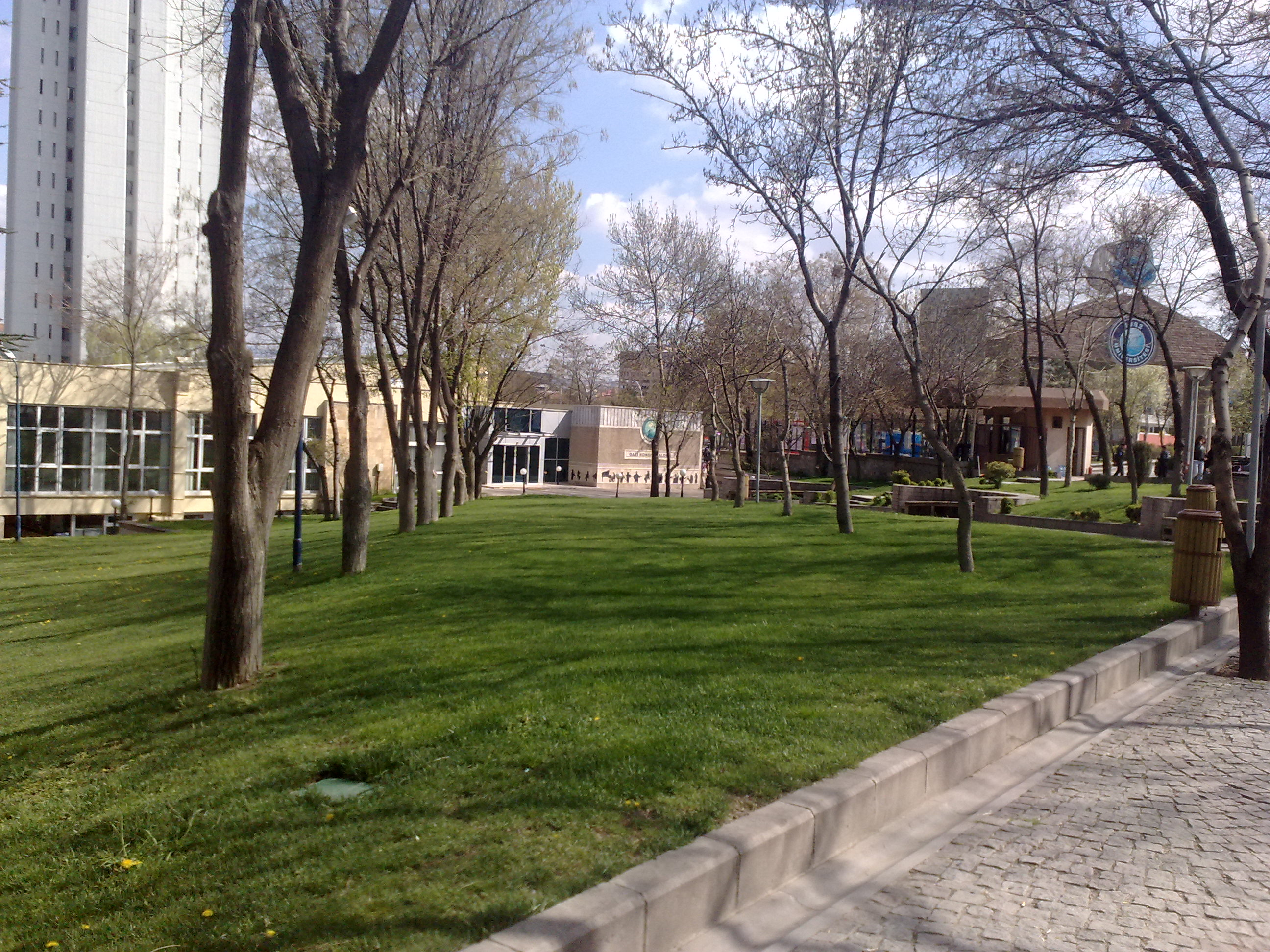 Gazi Üniversitesi'nden bir görüntü.